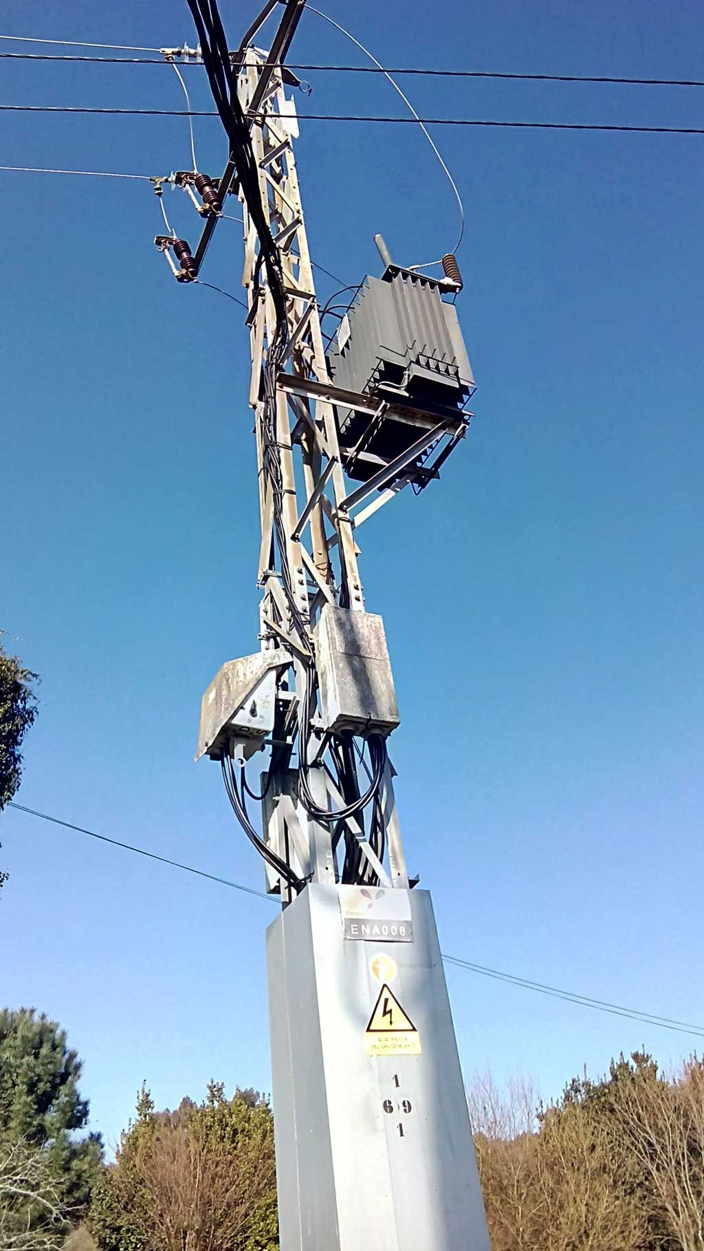 Poste eléctrico del Electra del Narahío en Sedes, Narón.